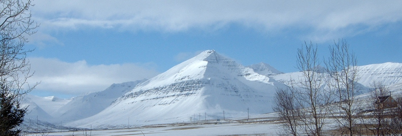 Stóllinn í Svarfaðardal, Skíðadalur t.v., Svarfaðardalur fram t.h.